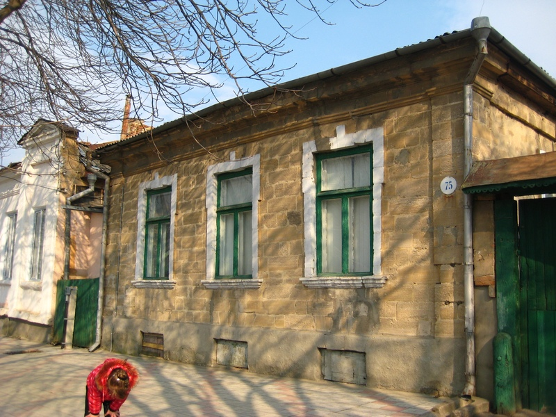 Бывший дом Василия Соколова